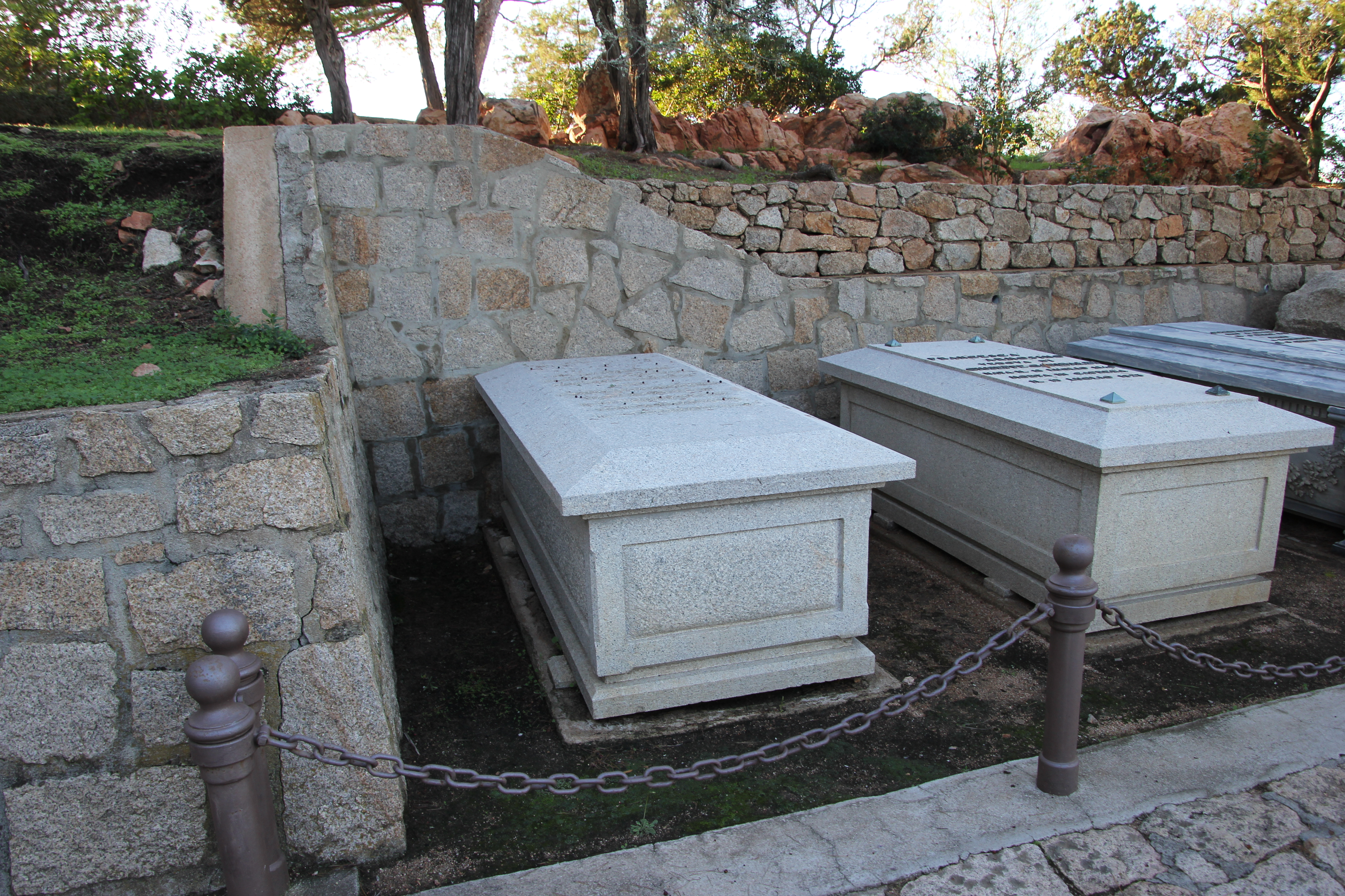 La Maddalena, compendio garibaldino di Caprera - Tomba di Clelia Garibaldi